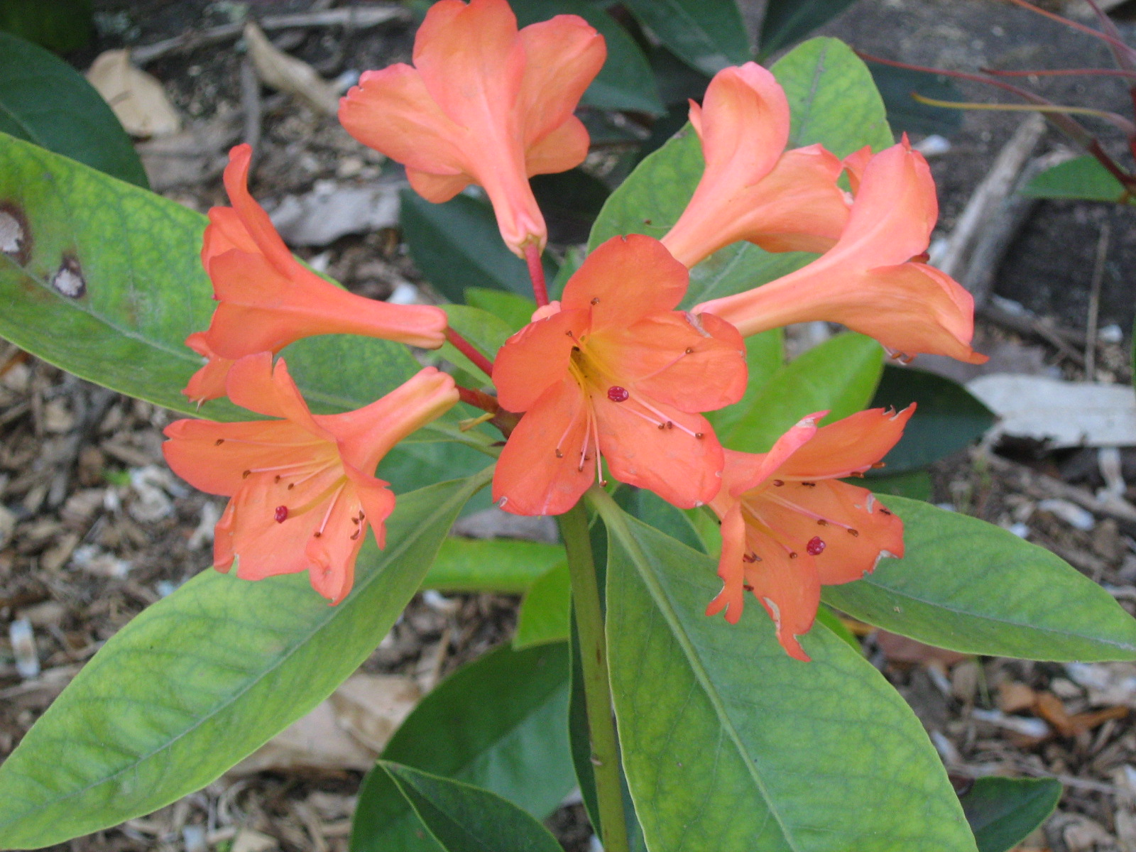 Azaleas en el Jardín Botánico de Medellín, Colombia